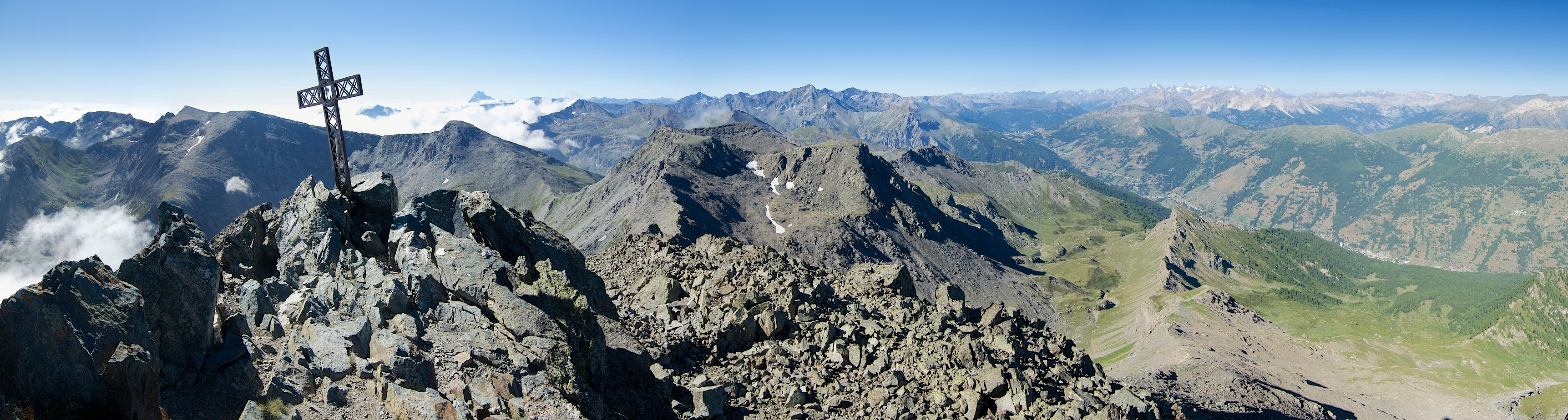 Panoramica dalla vetta dell'Albergian